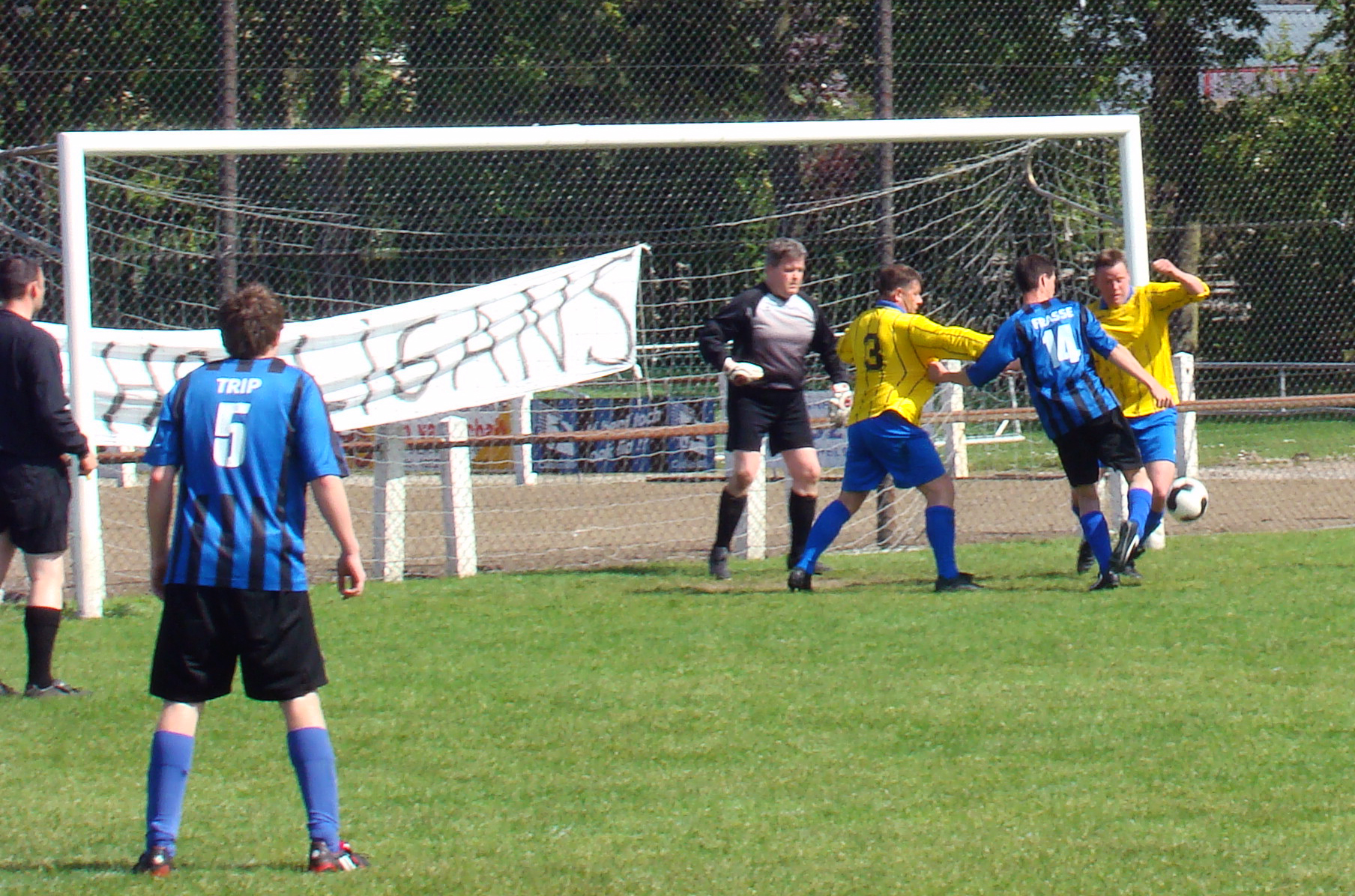 JVC tegen VV Flevo, competitiewedstrijd W1 Sen.Zon. 8e kl 802.